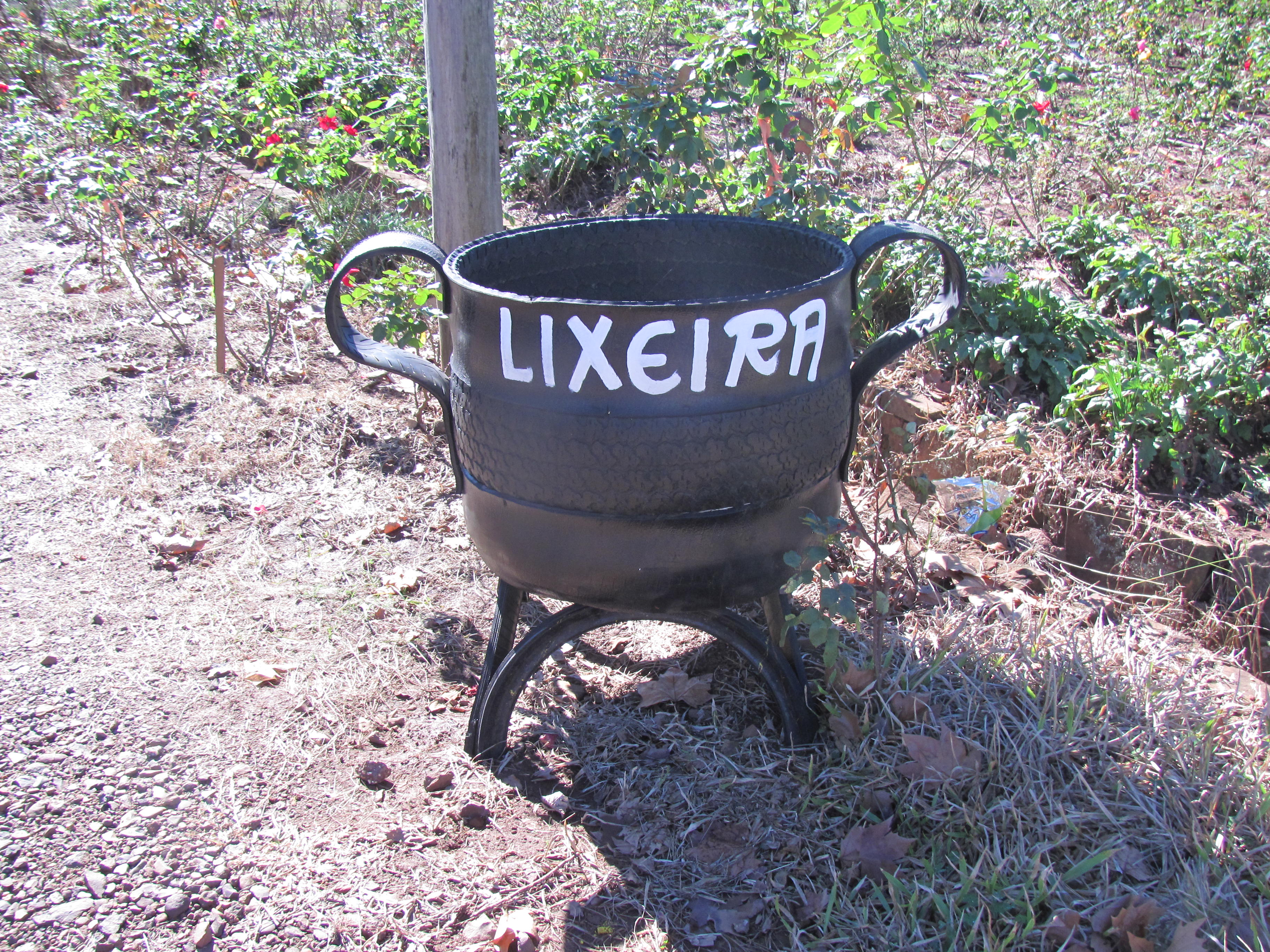 Lixeira feita com pneus velhos